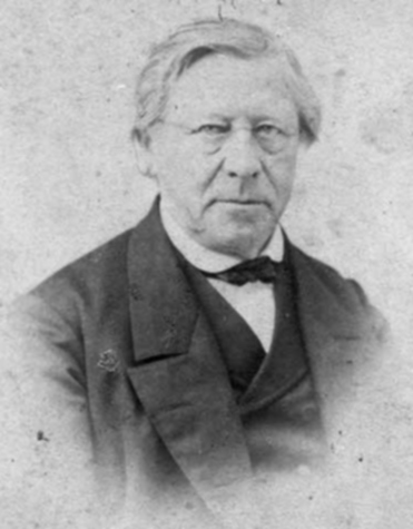 Markus Friedrich Wolfgang Bauer (1812-1874), Gründer und erster Inspektor der Neuendettelsauer Missionsanstalt